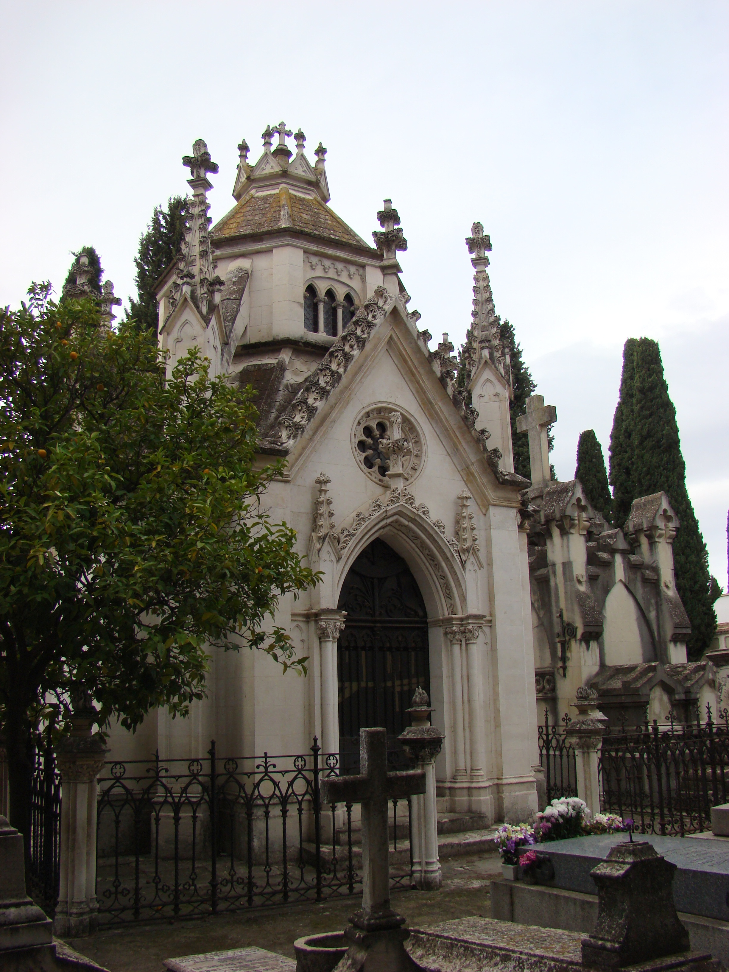 Patio de San Millán. "(ca. 1885), importante capilla neogótica que recuerda obras barcelonesas de Juan Martorell y Montells" (EL CEMENTERIO DE LA SACRAMENTAL DE SAN JUSTO: HISTORIA Y ARQUITECTURA Por CARLOS SAGUAR QUER) DSC00366